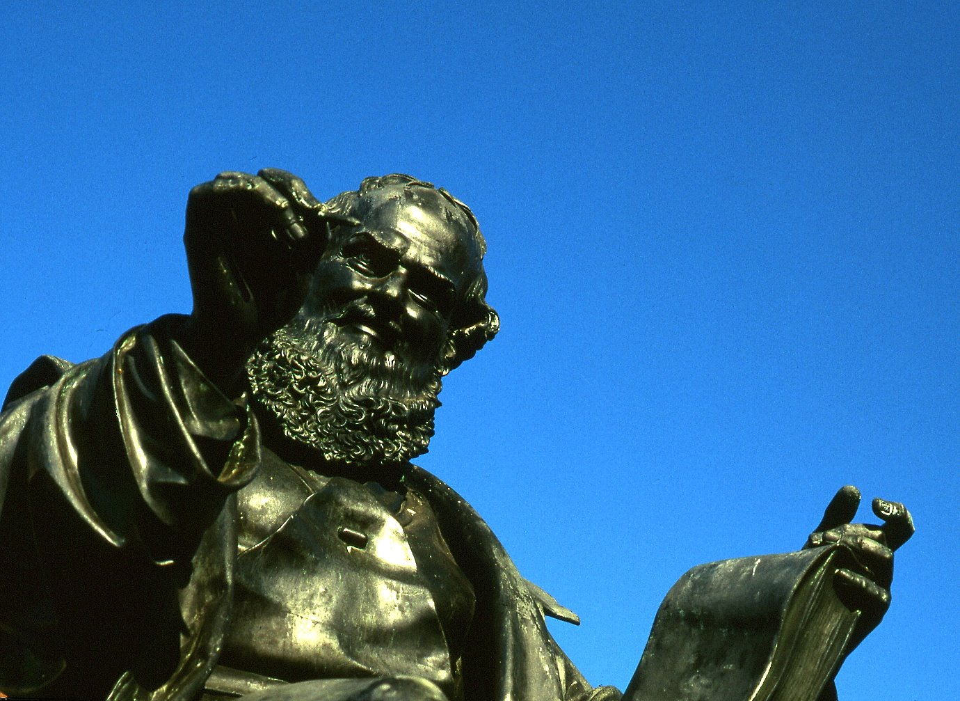 This statue was created to honor the German poet and shoemaker Hans Sachs who lived in Nuremberg (September 5, 1494 - January 19, 1576). Auf dem freien Platze, nahe seinem ehemaligen Wohnhäuschen, ist Hans Sachs in einem 1874 von Konrad Kraußer / Johann Konrad Krausser geschaffenen Denkmal verewigt.